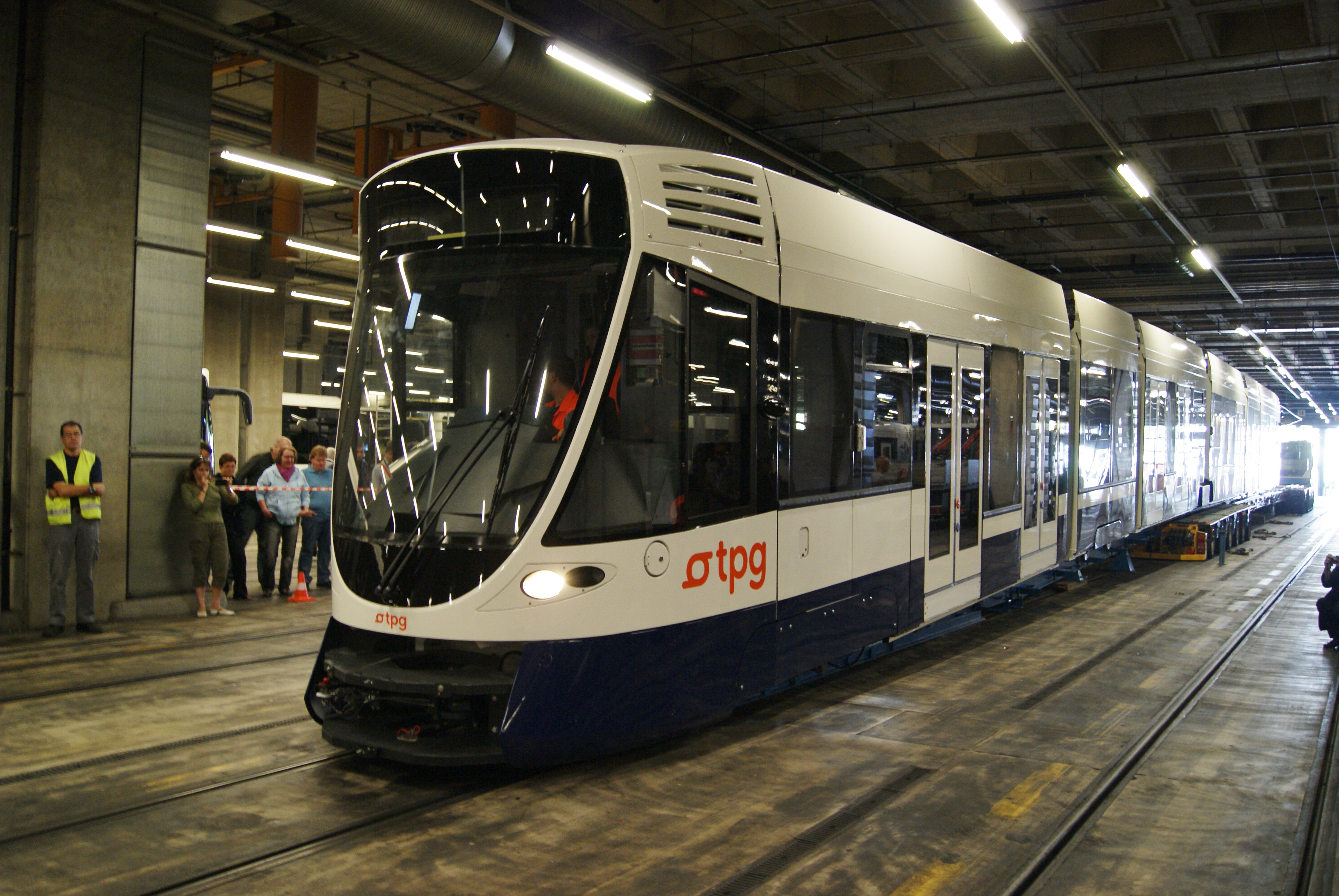 Photo. Trams aux Fils. Après le film le dernier Tango à Paris, voici la photo du premier (tram) Tango à Genève, qui est arrivé ce vendredi 16.09.2011 vers 10.30h. au dépôt du Bachet. Il portera le no 1801. Tango est le nom du nouveau tramway conçu par la maison Suisse Stadler sur la base de composants éprouvés. Le tramway Tango est disponible en deux variantes: 100% plancher haut ou avec 70% de plancher bas. Le Tango est un tramway bidirectionnel. Il s’adapte à des écartements de voies de 1435mm et 1000mm, d’autres largeurs de voie étant possibles. A Genève, le tram Tango sera avec 70% de plancher bas et un écartement de voies de 1000mm, la série sera composée de 32 trams no 1801 à 1832.